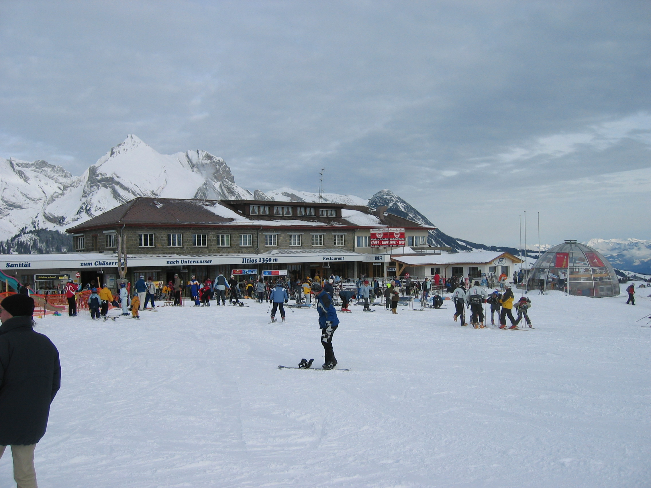 Iltios, Bergbahnstation und Restaurant